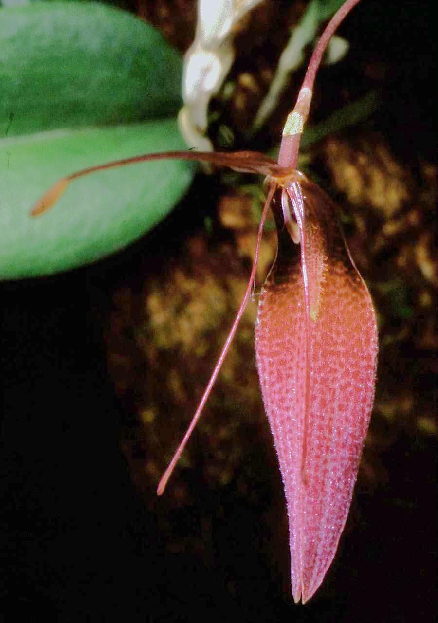 Restrepia dodsonii - flower